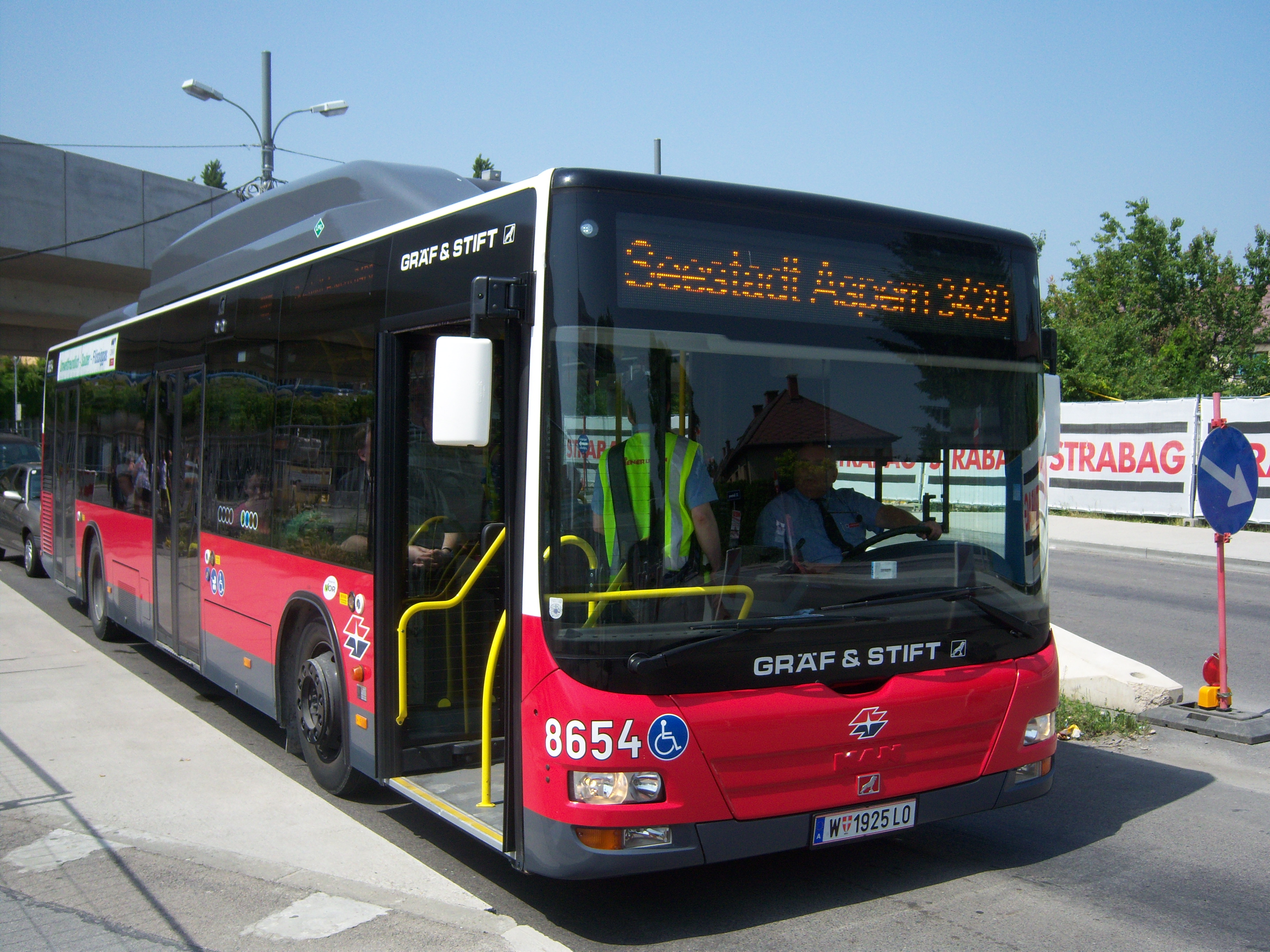 Ein Shuttlebus von der Station Donauspital zur Seestadt Aspern